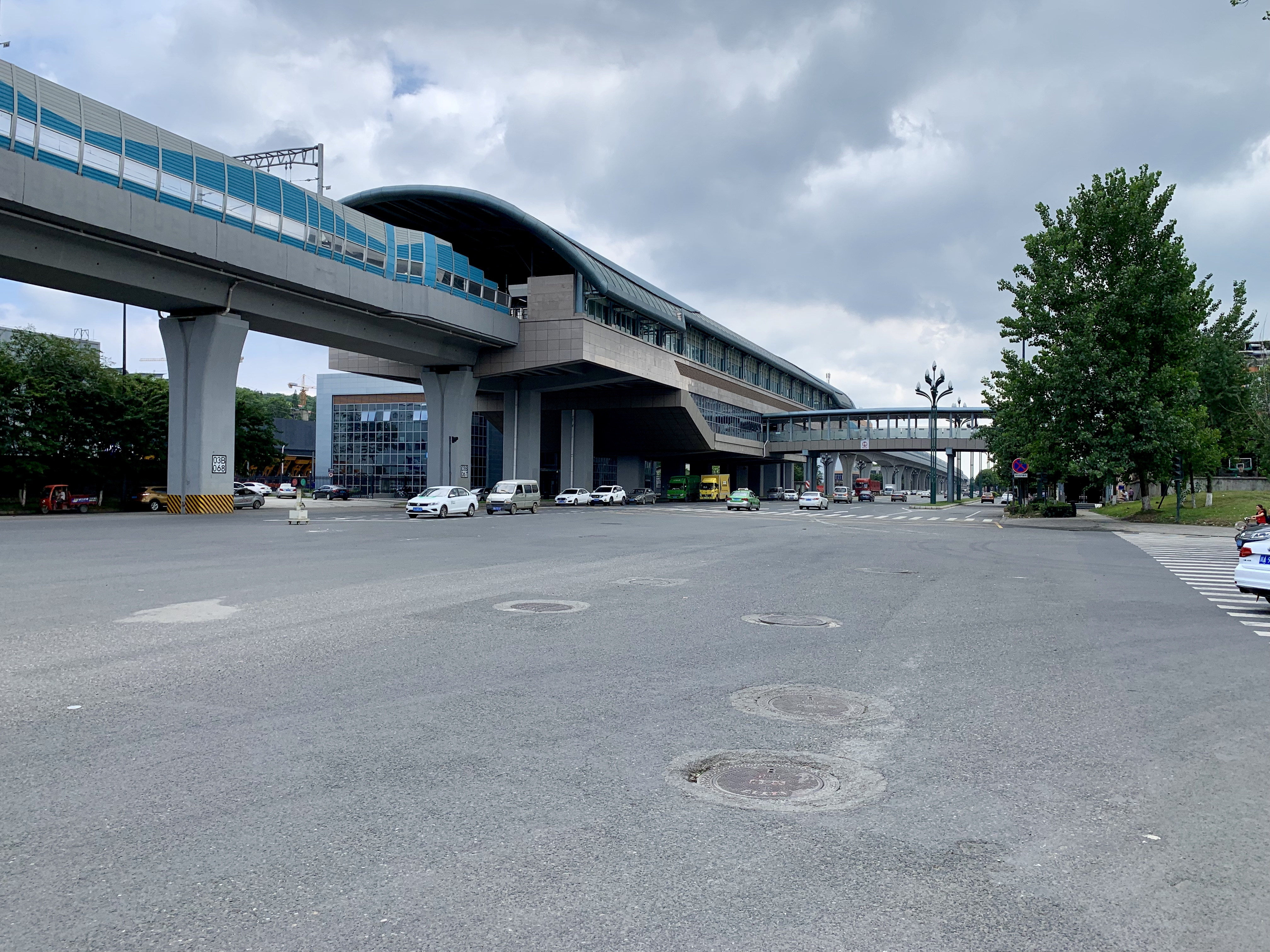 成都地铁金华寺东路站